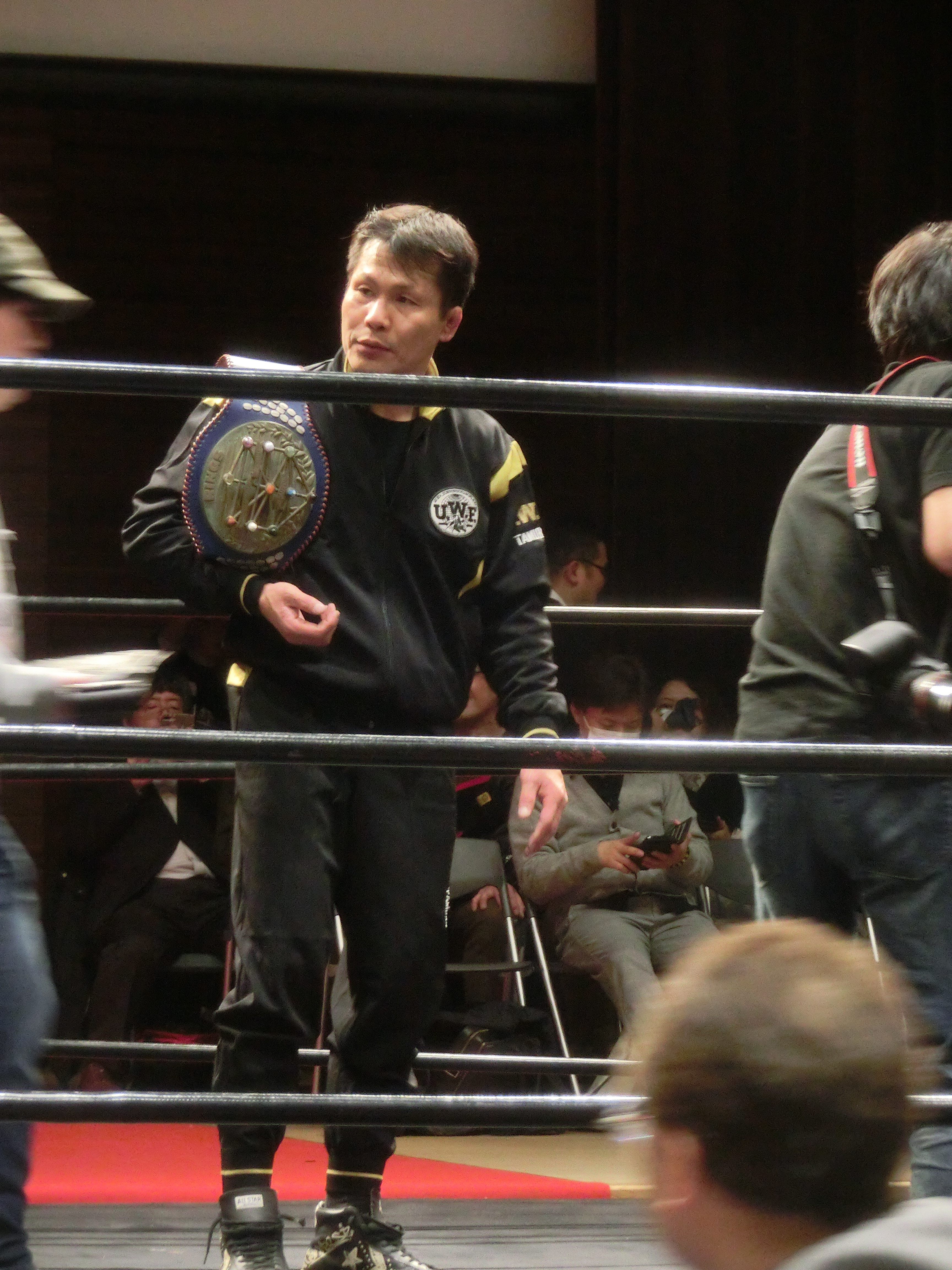 Masa Saito mourning performance